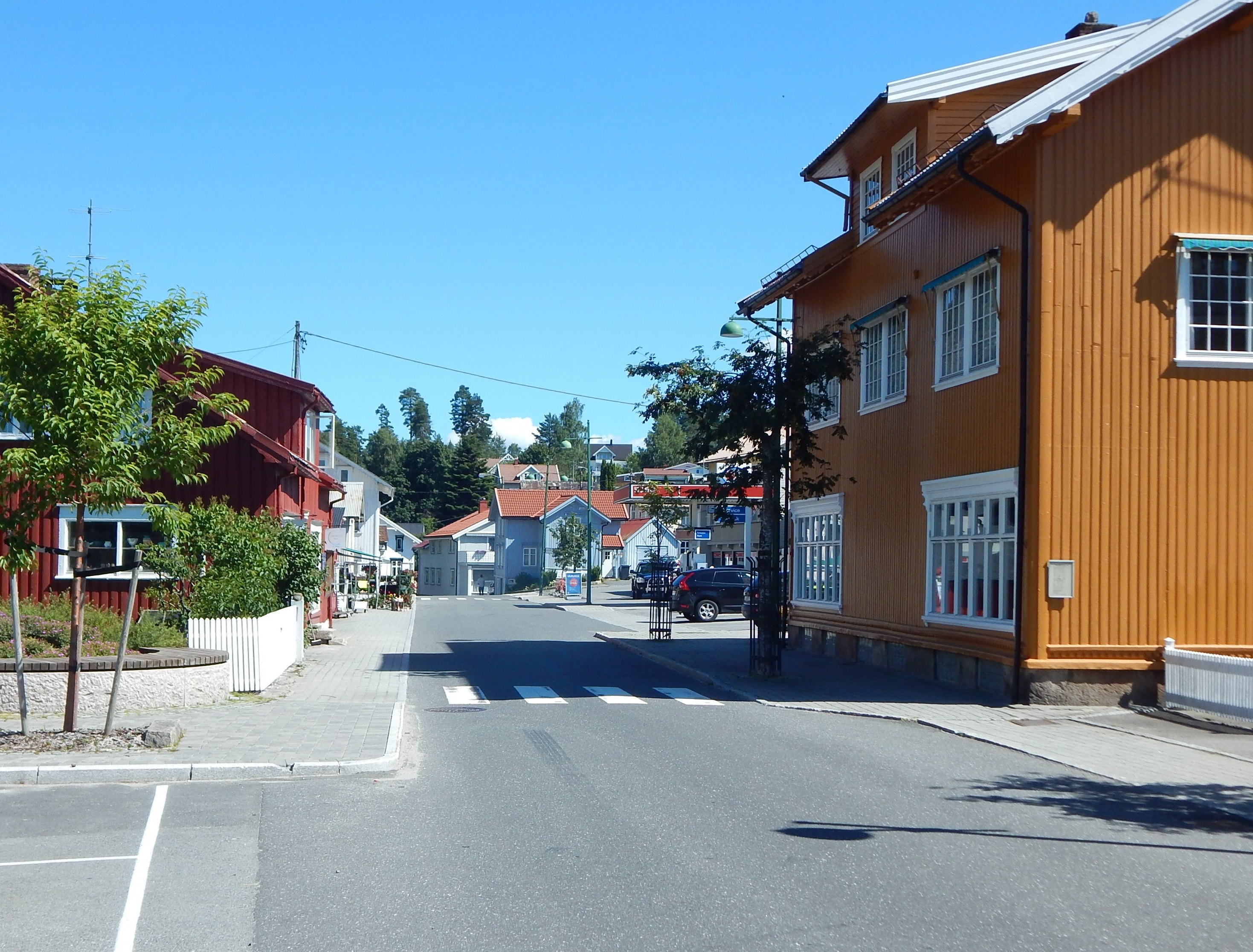 Gata gjennom Åmli tettsted